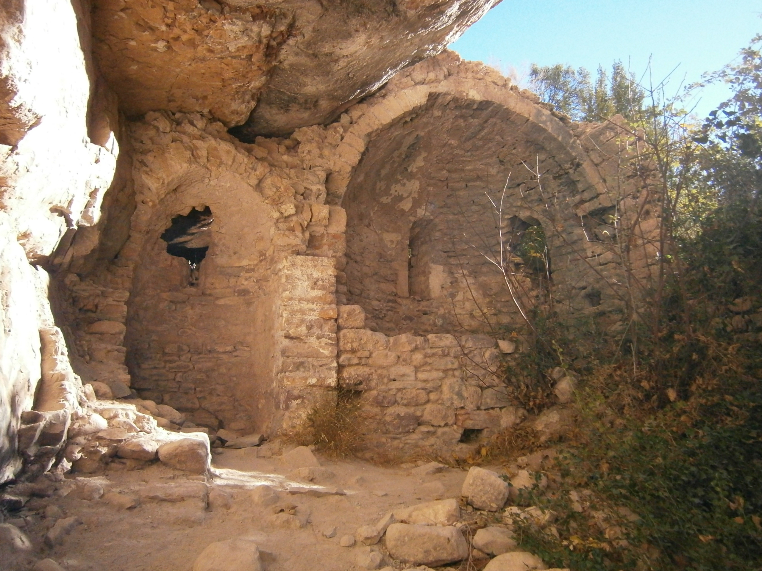 En una bauma en el Barranc de Sant Pere en Collegats se encuentran los restos de este antiguo monasterio